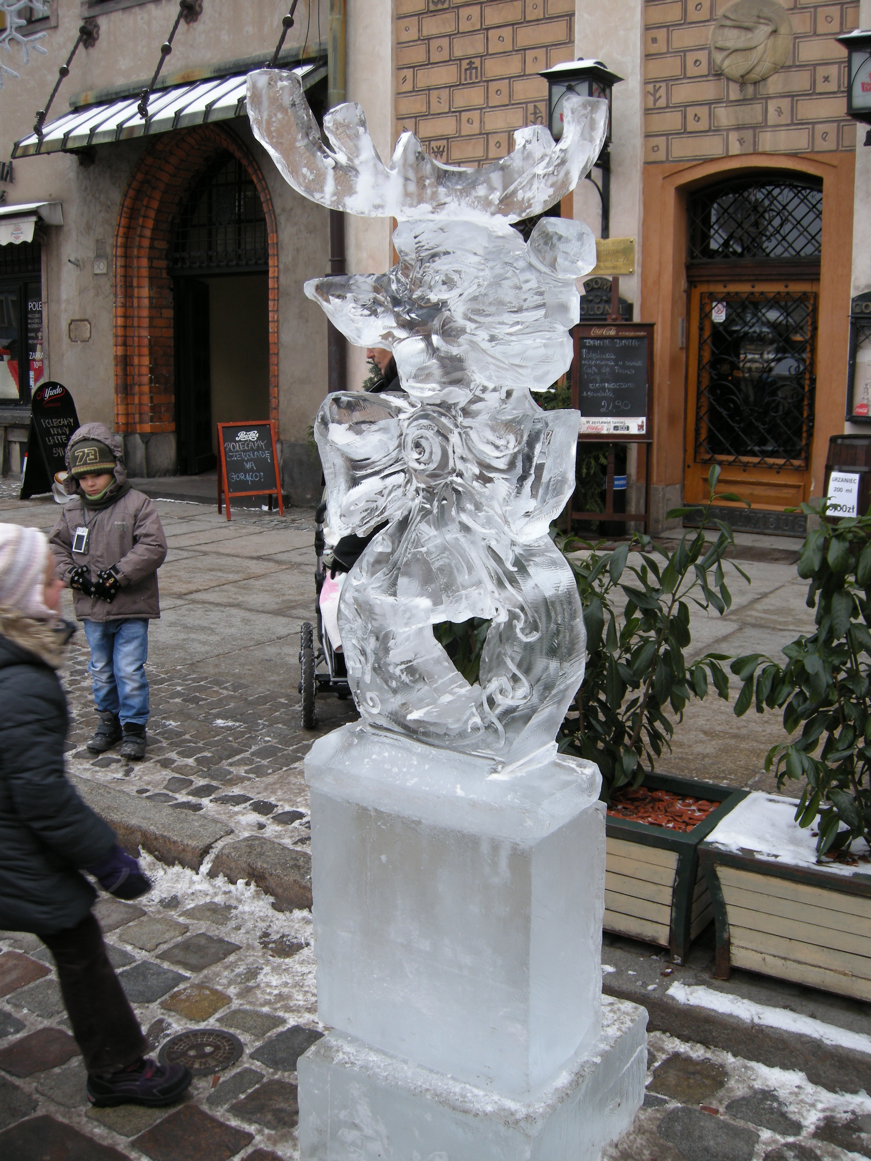 Międzynarodowy festiwal rzeźby lodowej w Poznaniu. 2012.